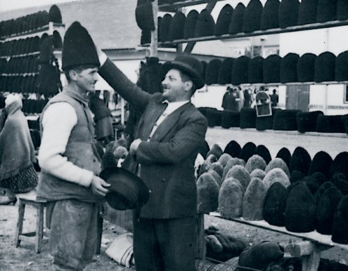 Un ţăran işi inlocuieste pălăria cu o cuşmă de oaie, la taraba unui comerciant